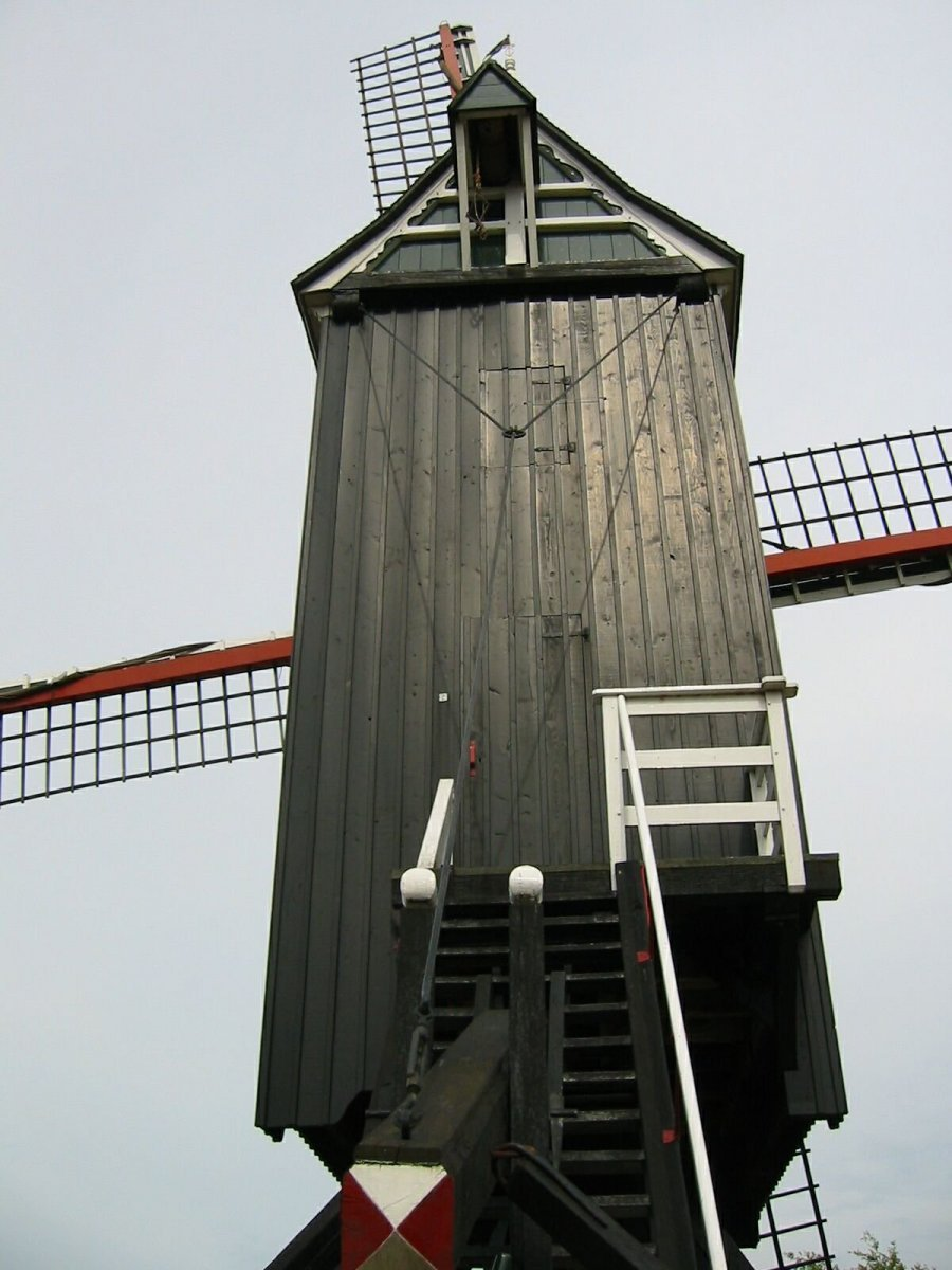 Groenendijk/ Ten-Bruggencatenummer: 04199: Achterzijde van de kast van open standerdmolen (opmerking: Foto gemaakt in het kader van het project Actualisering Monumentenregister (AMR).)